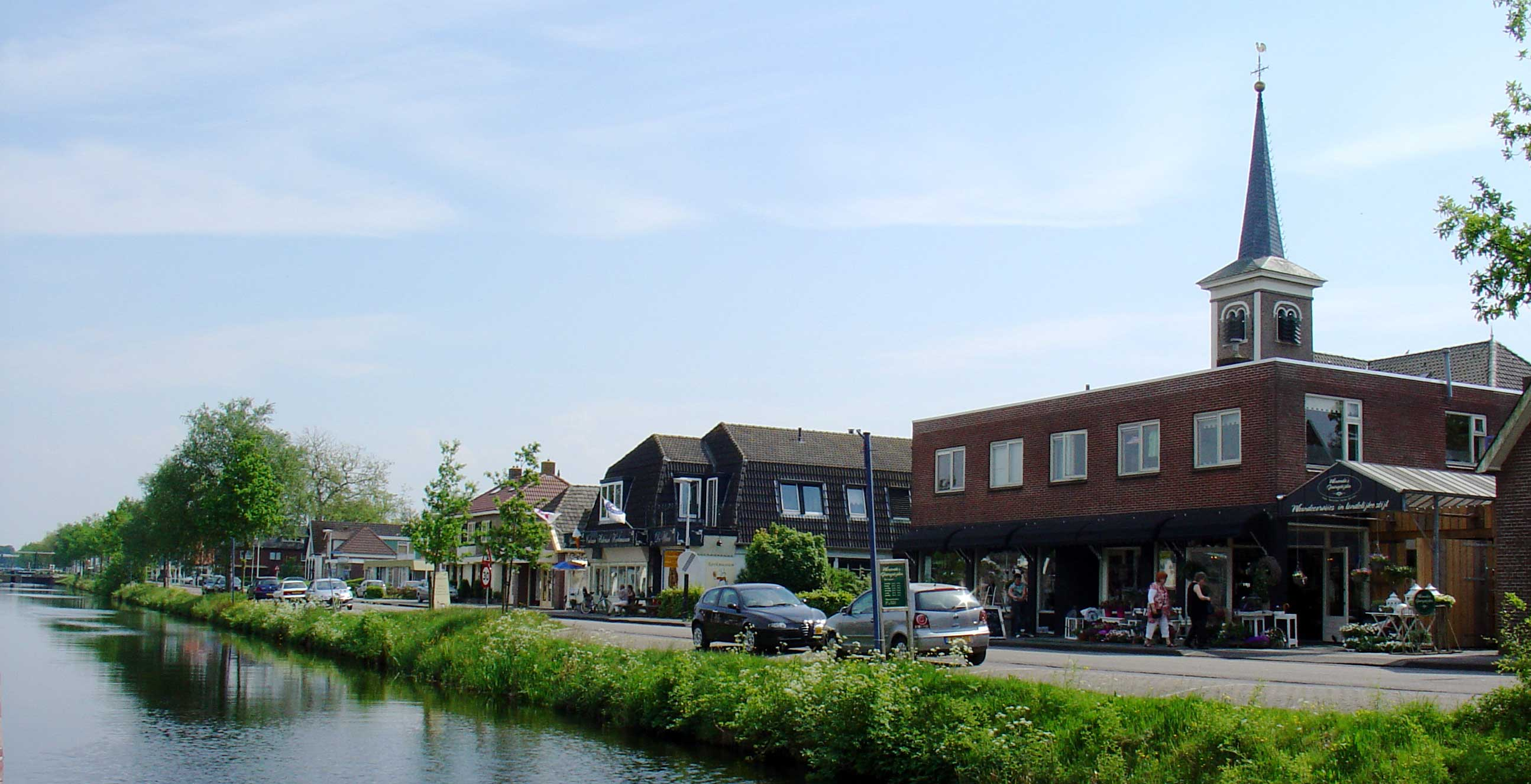 Appelscha met kerk aan de Opsterlandse Compagnonsvaart